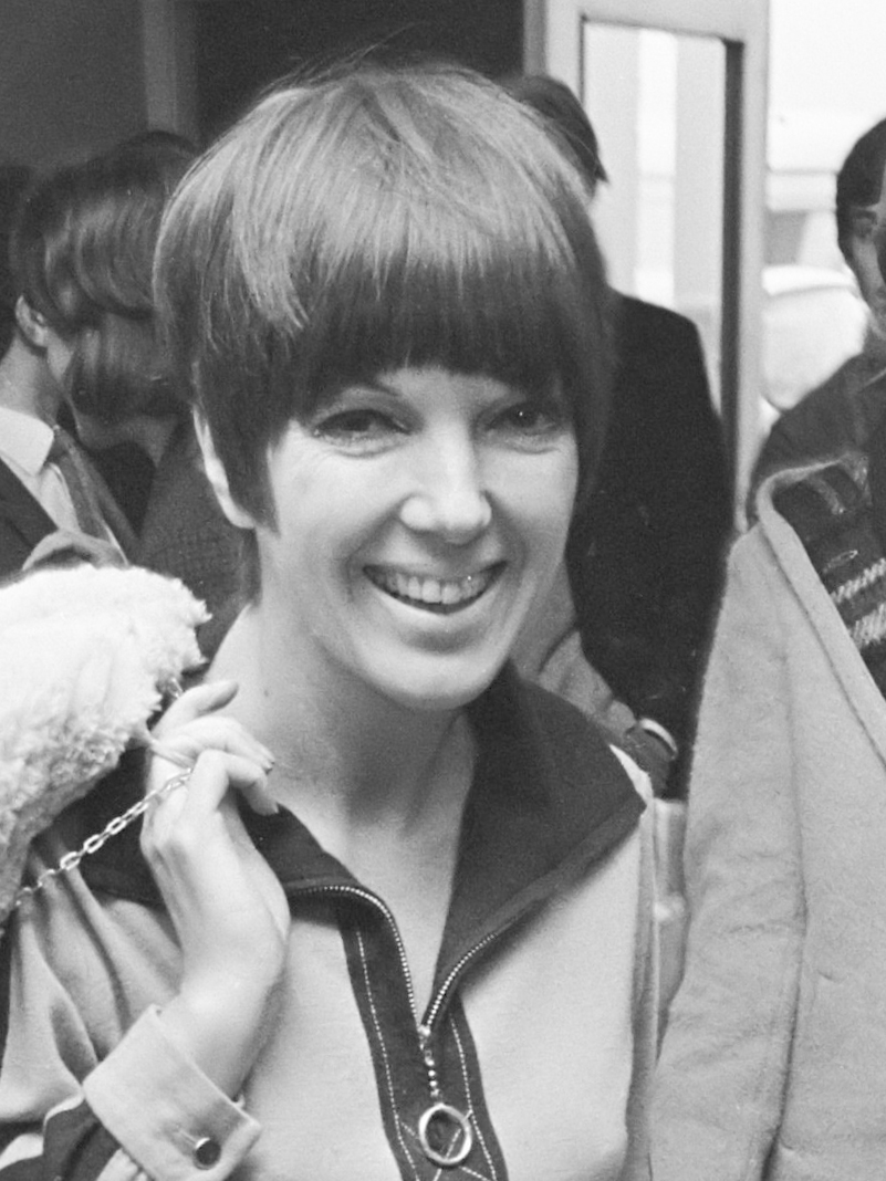 Aankomst Mary Quant (Engelse mode-koningin) op Schiphol 16 december 1966